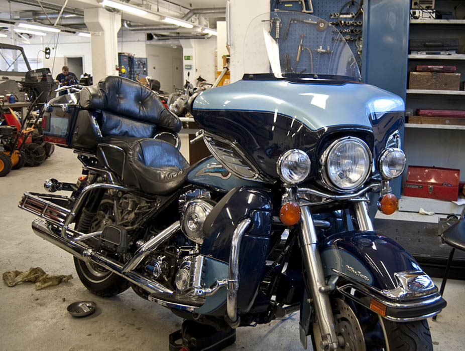 Harley-Davidson-moottoripyörä huollossa Vaihtoehtoisessa ammatti- ja oppisopimuskoulussa Helsingin Roihupellossa